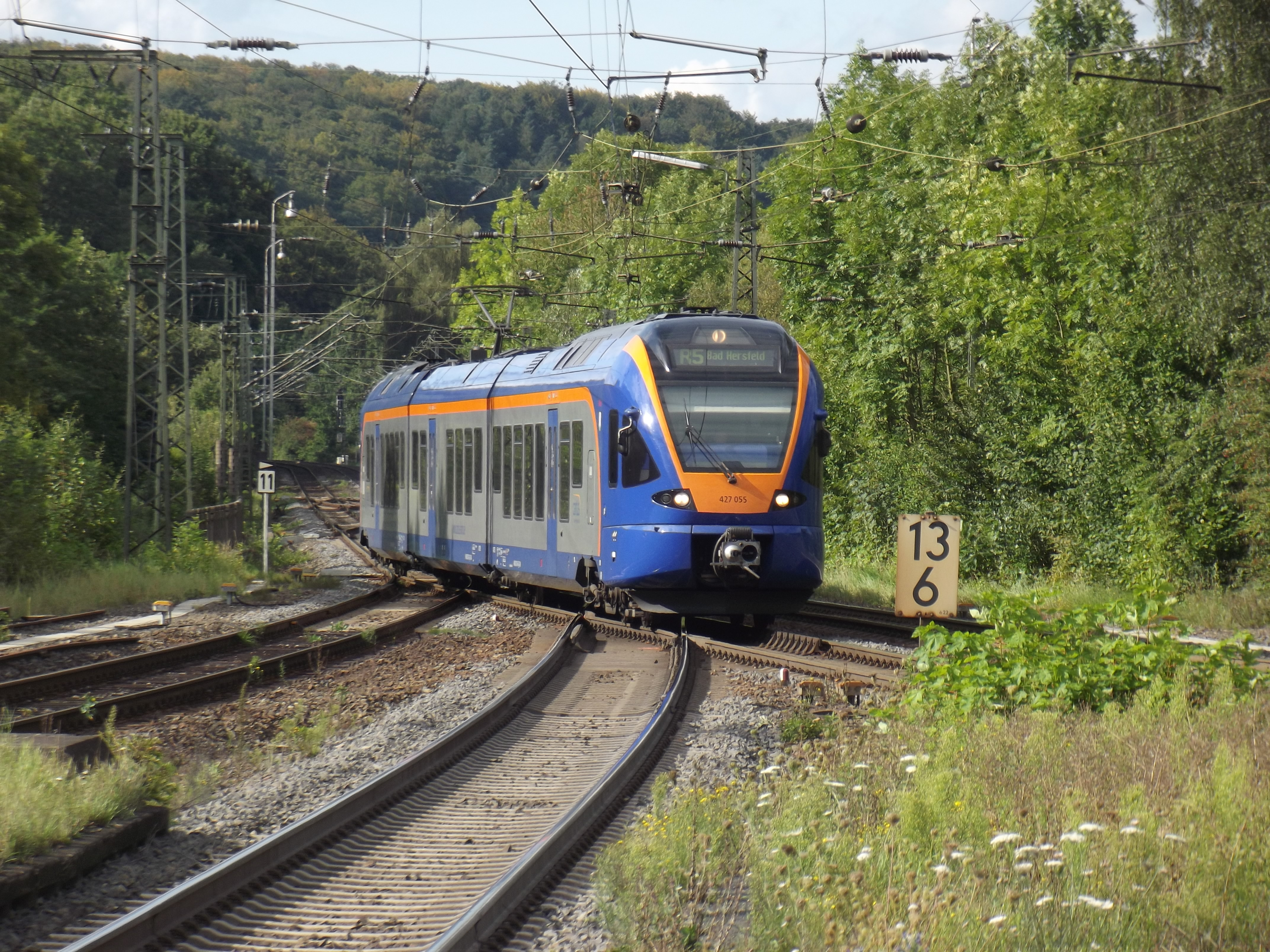 Stadler FLIRT op R5 lijn